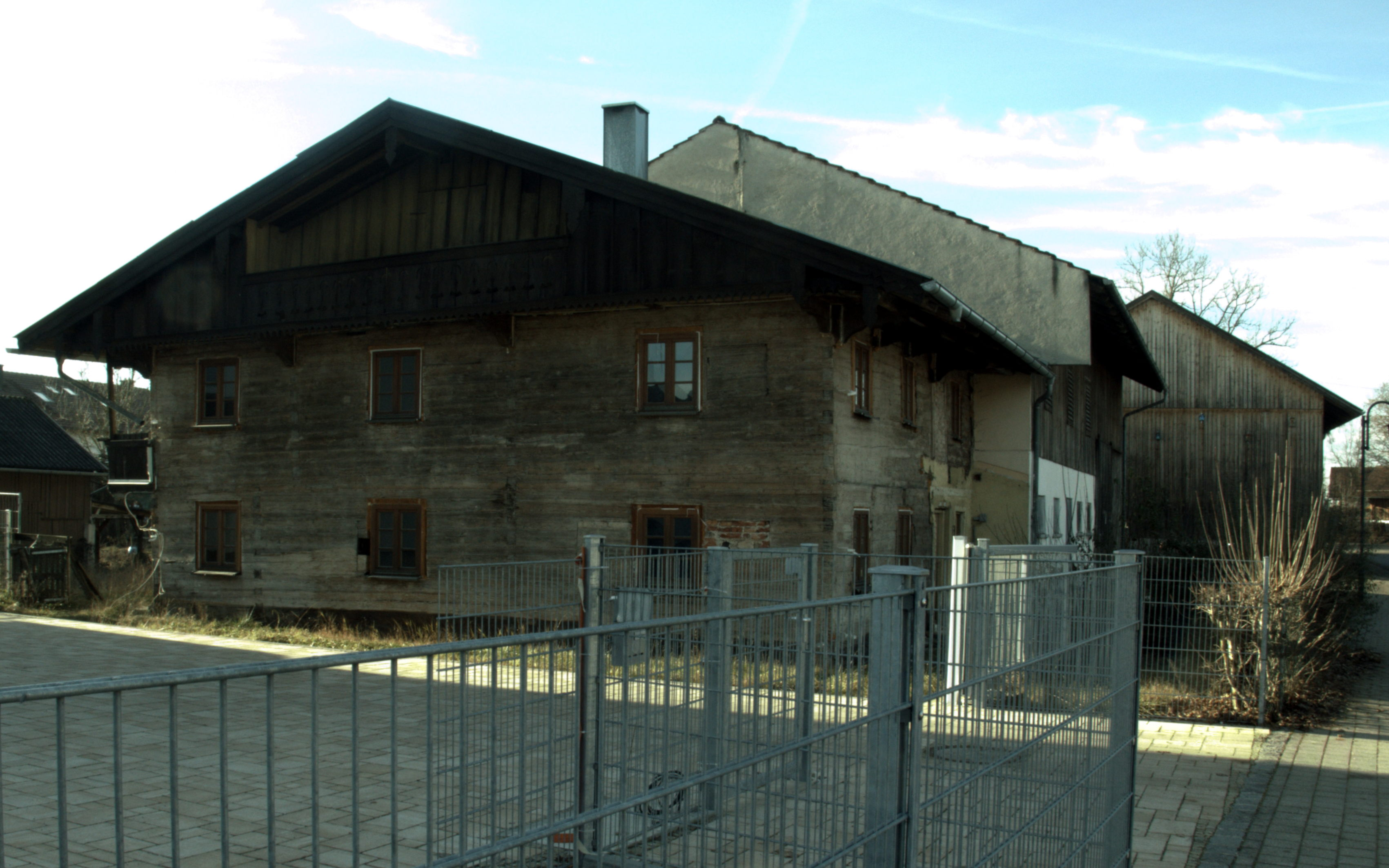 Ehemaliger Bauernhof in Dürnnhaar, Egmatinger Straße 4. Übersicht. Aufnahme aus Ost.